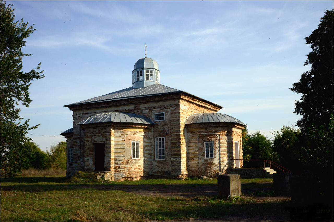 Воскресенська церква (мур.) , Снітин